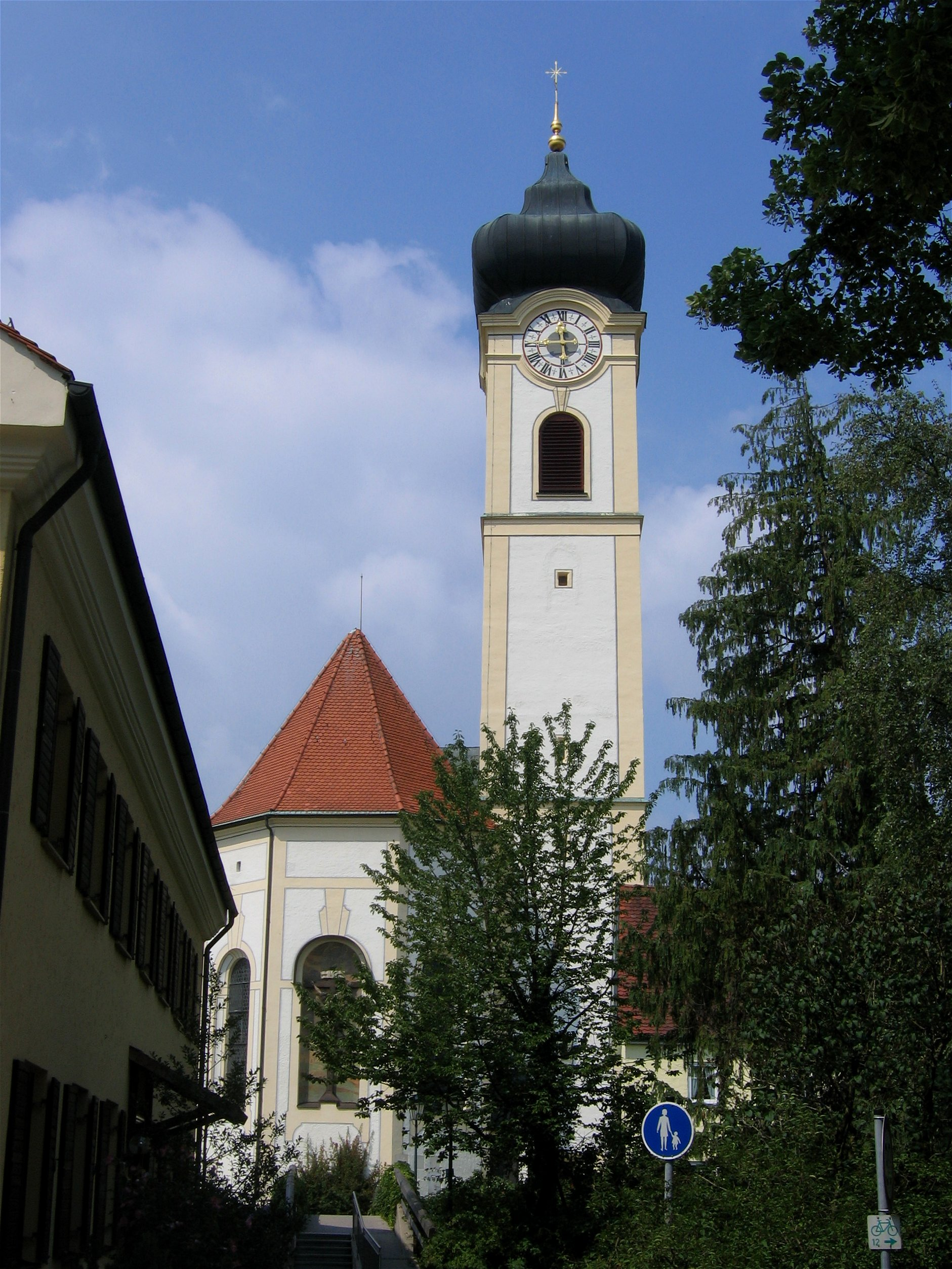 Hofberg 1. Kath. Stadtpfarrkirche St. Mariä Himmelfahrt, Saalbau mit flankierendem Chorturm mit Kuppelhaube, im Kern spätgotisch, barocke Anlage von Abraham Millauer nach Plan von Johann Michael Fischer, 1755/56; mit Ausstattung.